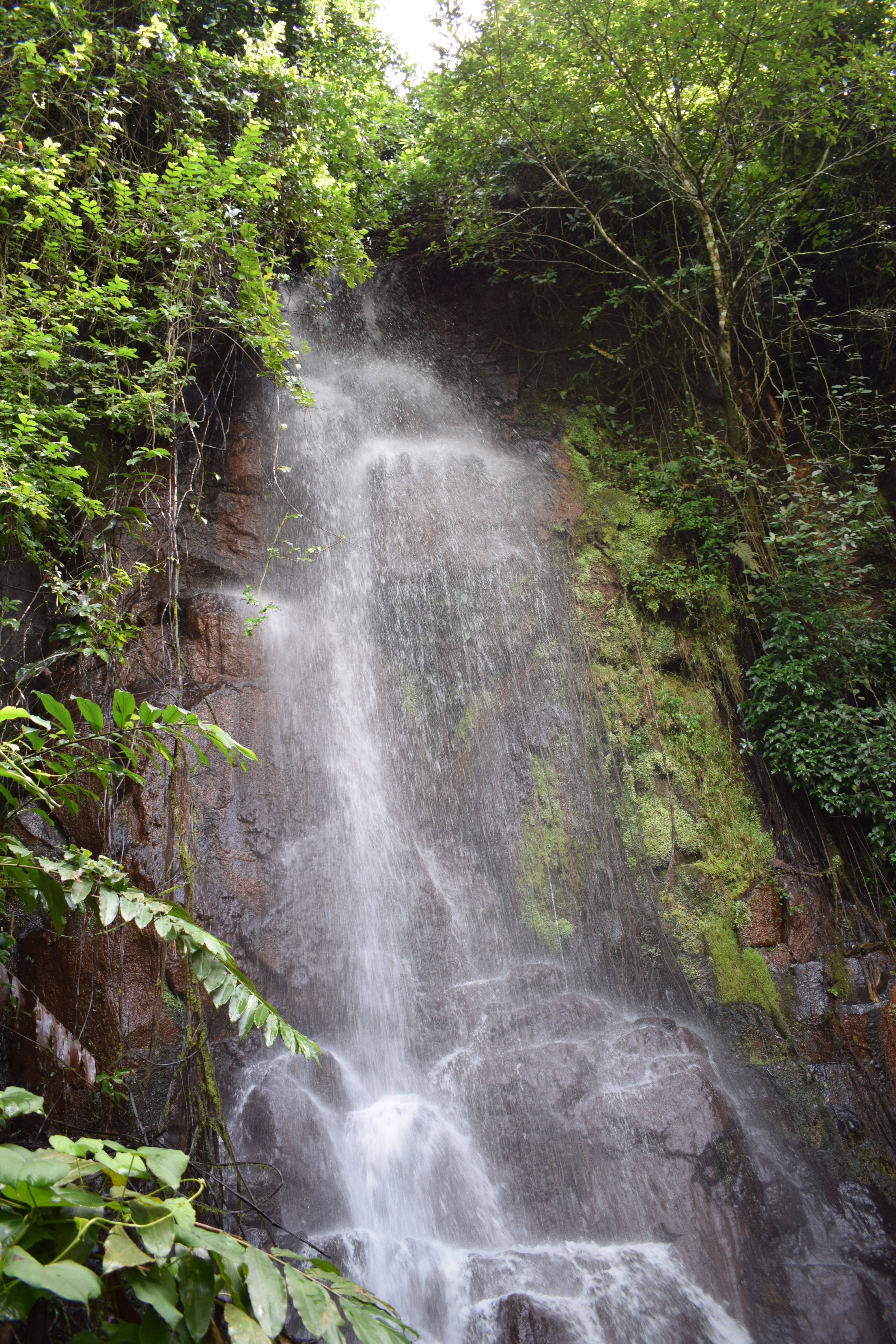 La chute de Pebe situé dans le département du NkoungKhi près de Bandjoun